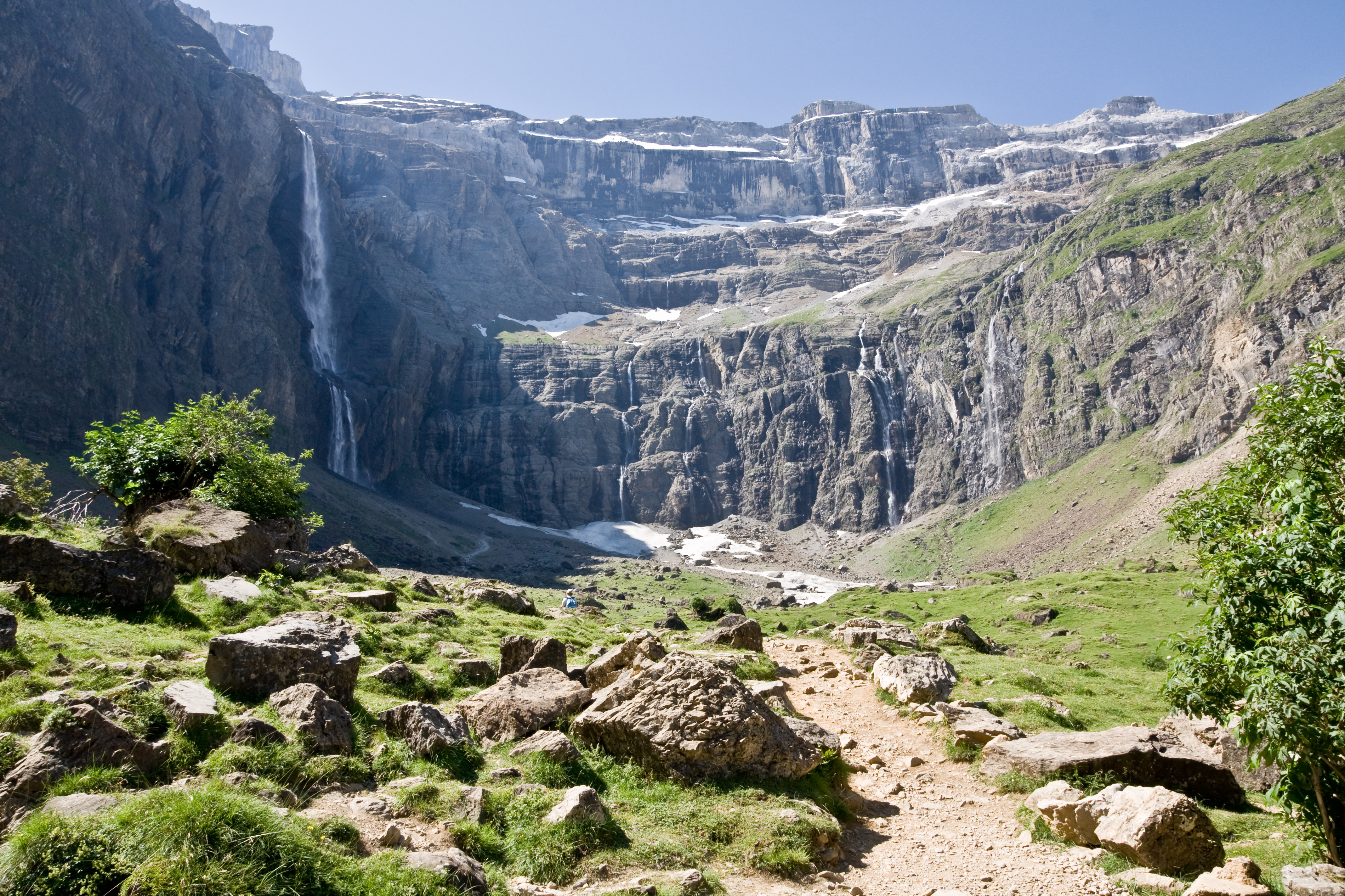 Cirque de Gavarnie - Hautes Pyrénées - France